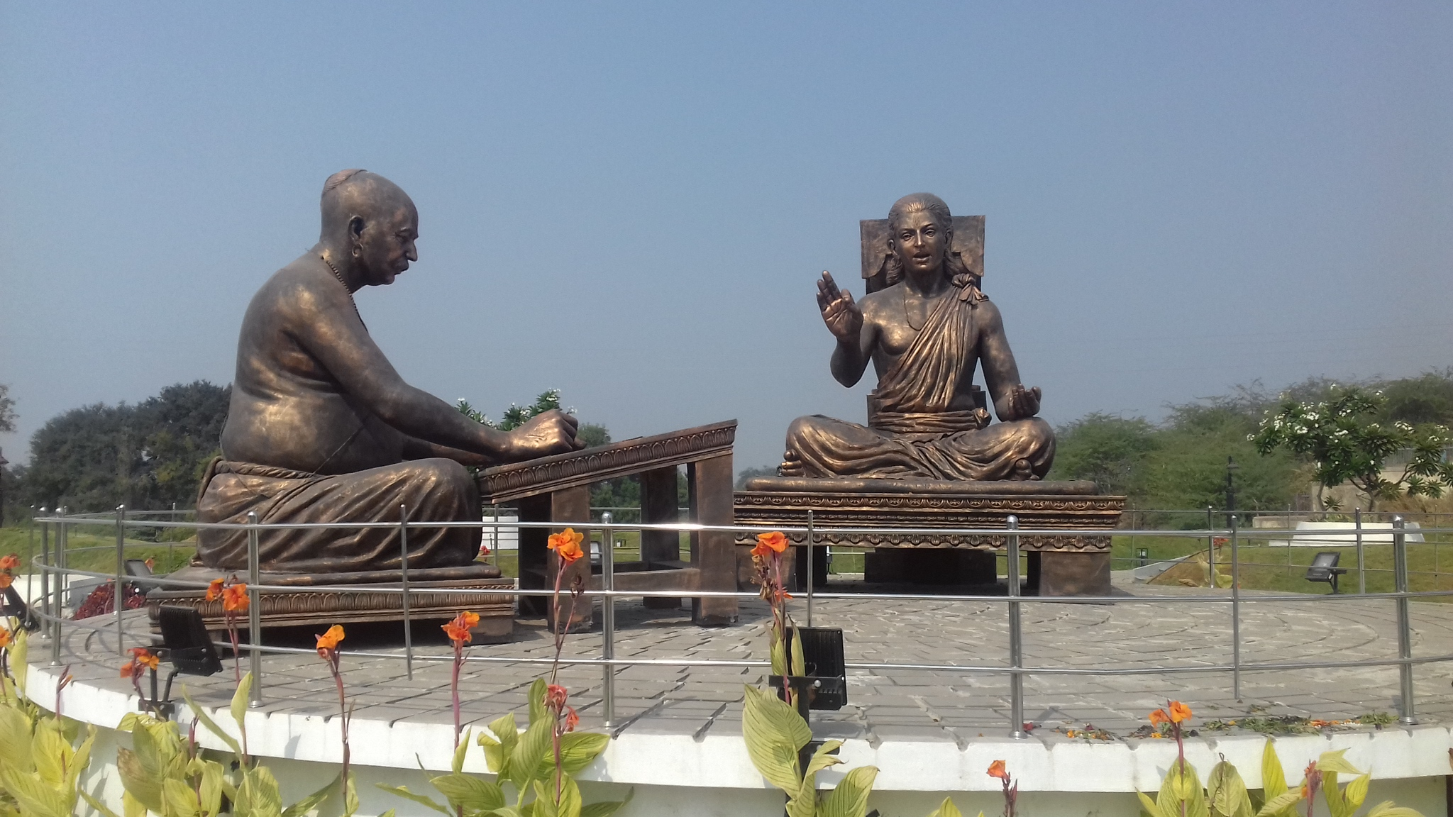 नेवासा येथील संत ज्ञानेश्वर सच्चिदानंद बाबांना ज्ञानेश्वरी सांगत असतानाच्या दृश्याचे शिल्प.